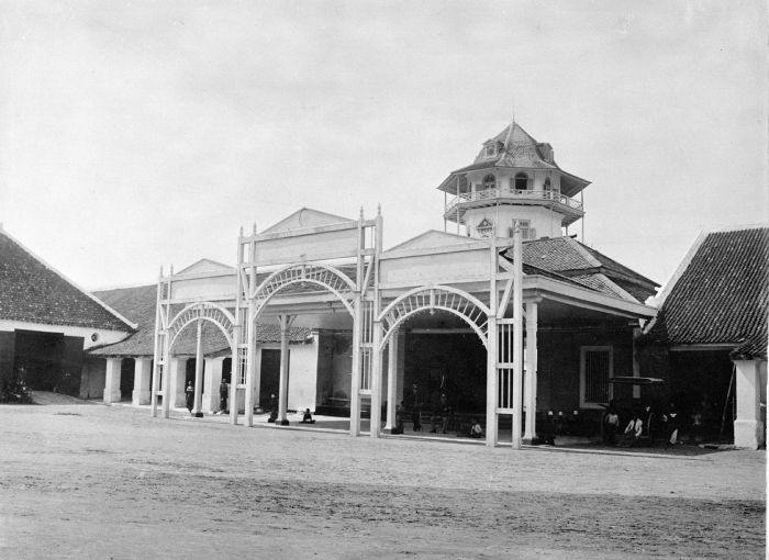 foto. De kamandoengan, de tweede poort van de kraton te Soerakarta.